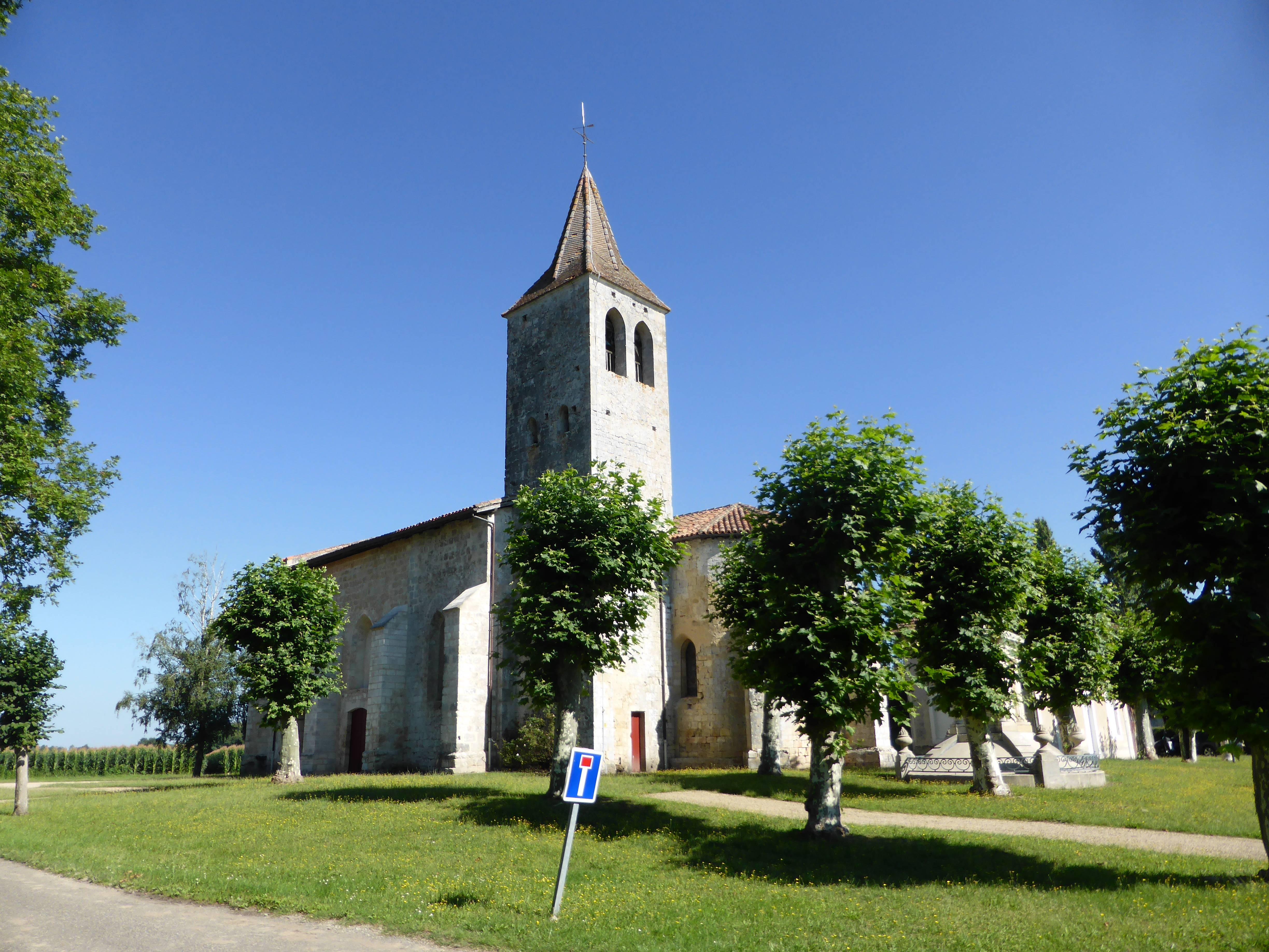 Église de Herré, dans les Landes.